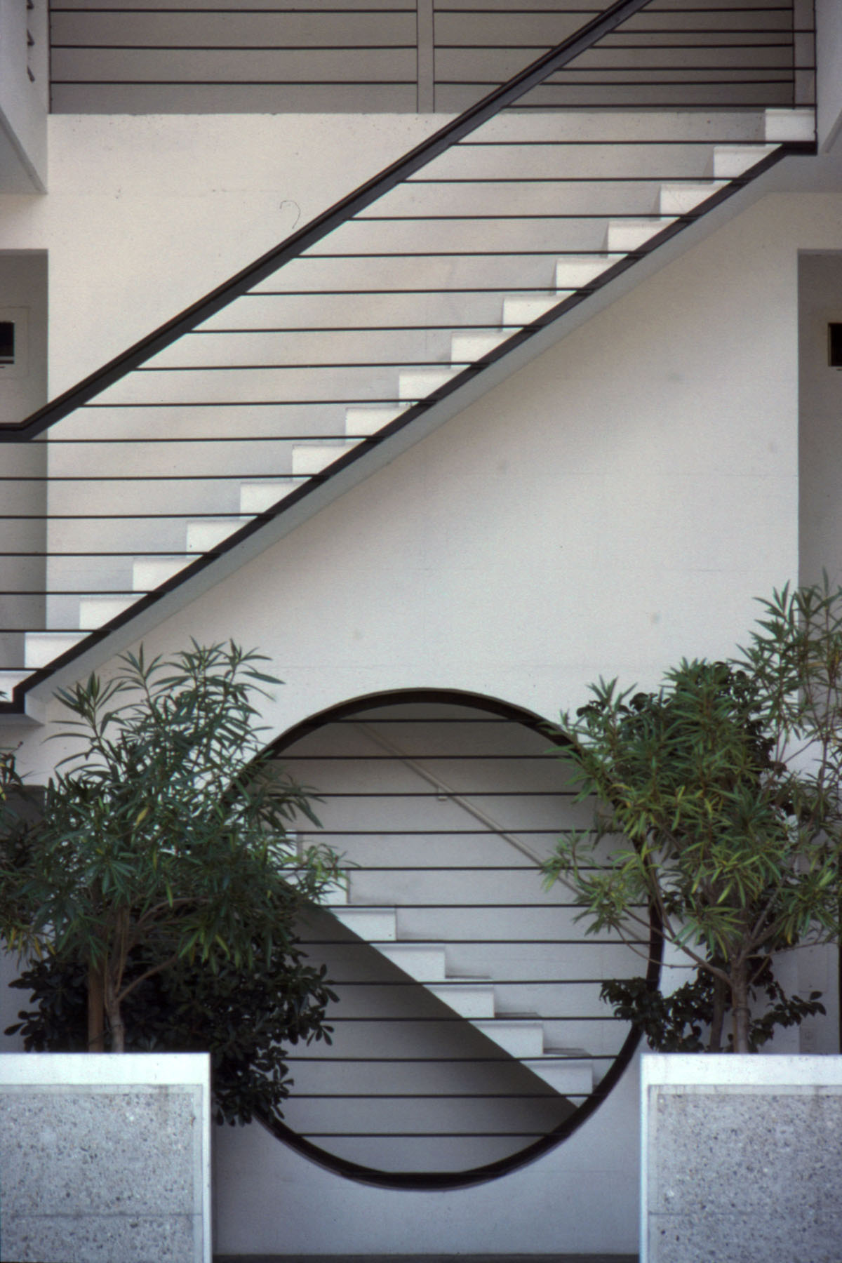 Bellinzona, Bianco e Nero (arch. Aurelio Galfetti 1985-86)